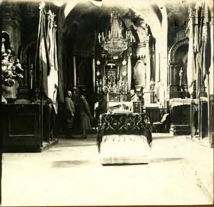 Центральний вівтар церкви Святої Трійці в Зарваниці. Місце перебування чудотворної ікони Розп'яття Ісуса Христа з 1754 по 1944 рік. Зліва помітно частину проповідальниці, посередині - велику кришталеву люстру, а на самому вівтарі - чотири "дзеркала" гданської роботи.